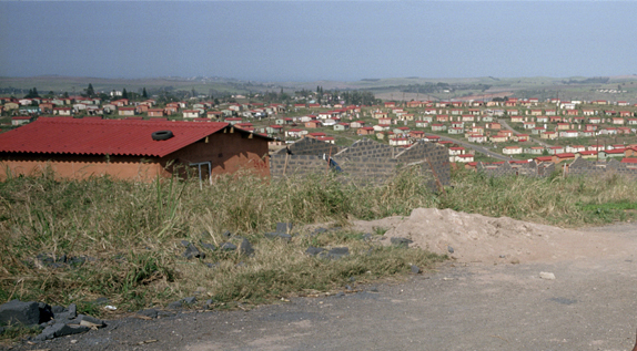 Shakaskraal, KwaZulu-Natal, South Africa